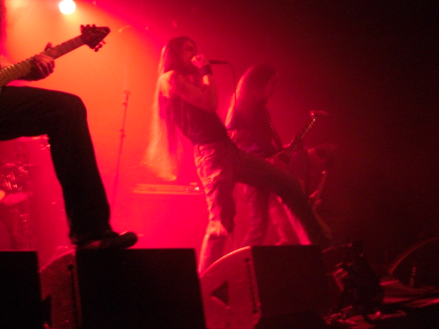 Degradead, Klubben Stockholm, 1:2008